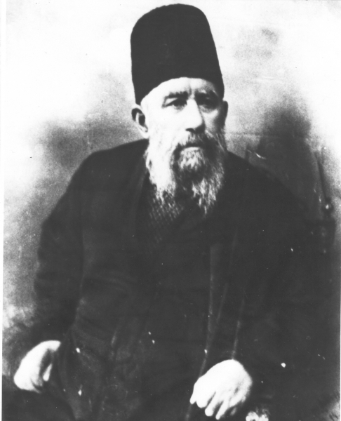 Бакинский миллионер Гаджи Шихали бек Дадашев. Баку, Бакинская губерния, 1900-1910